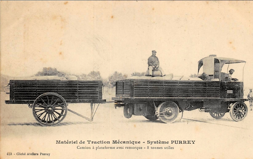 Publicity post-cards